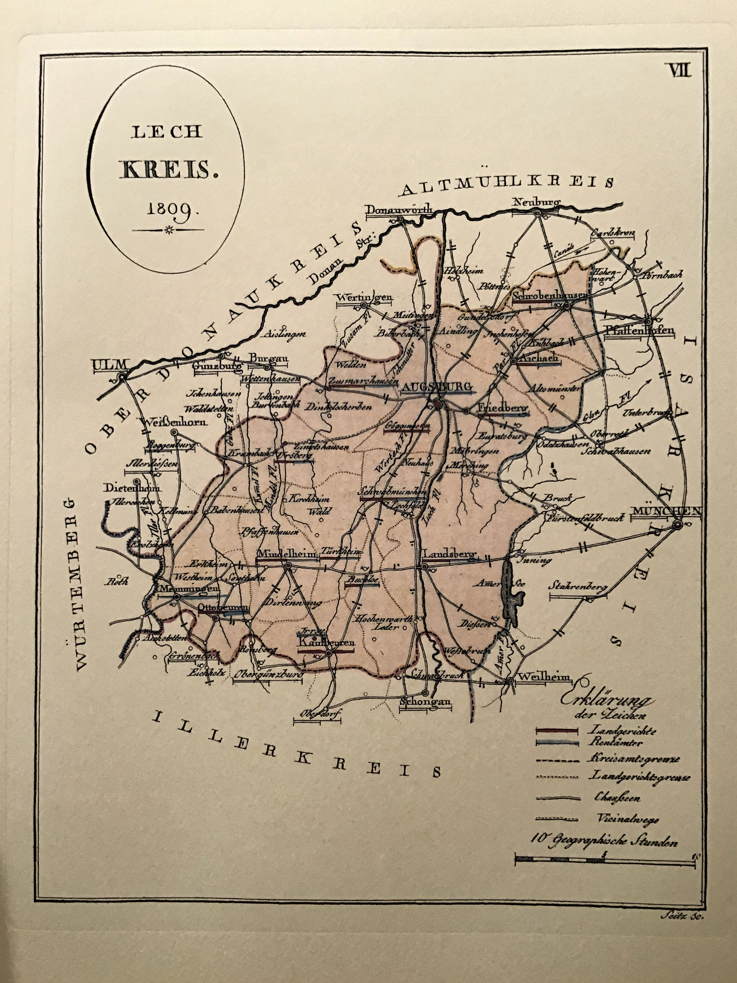 Kopien des Buchs "Das Königreich Bayern in fünfzehen Kreise eingetheilt", von 1809. Originalausgabe von 1809 BSB München, Signatur: Mapp. XI 50